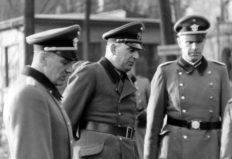 Major d. Sch. Fuchs, General der Polizei Daluege, Oberst d. Sch. Winkelmann